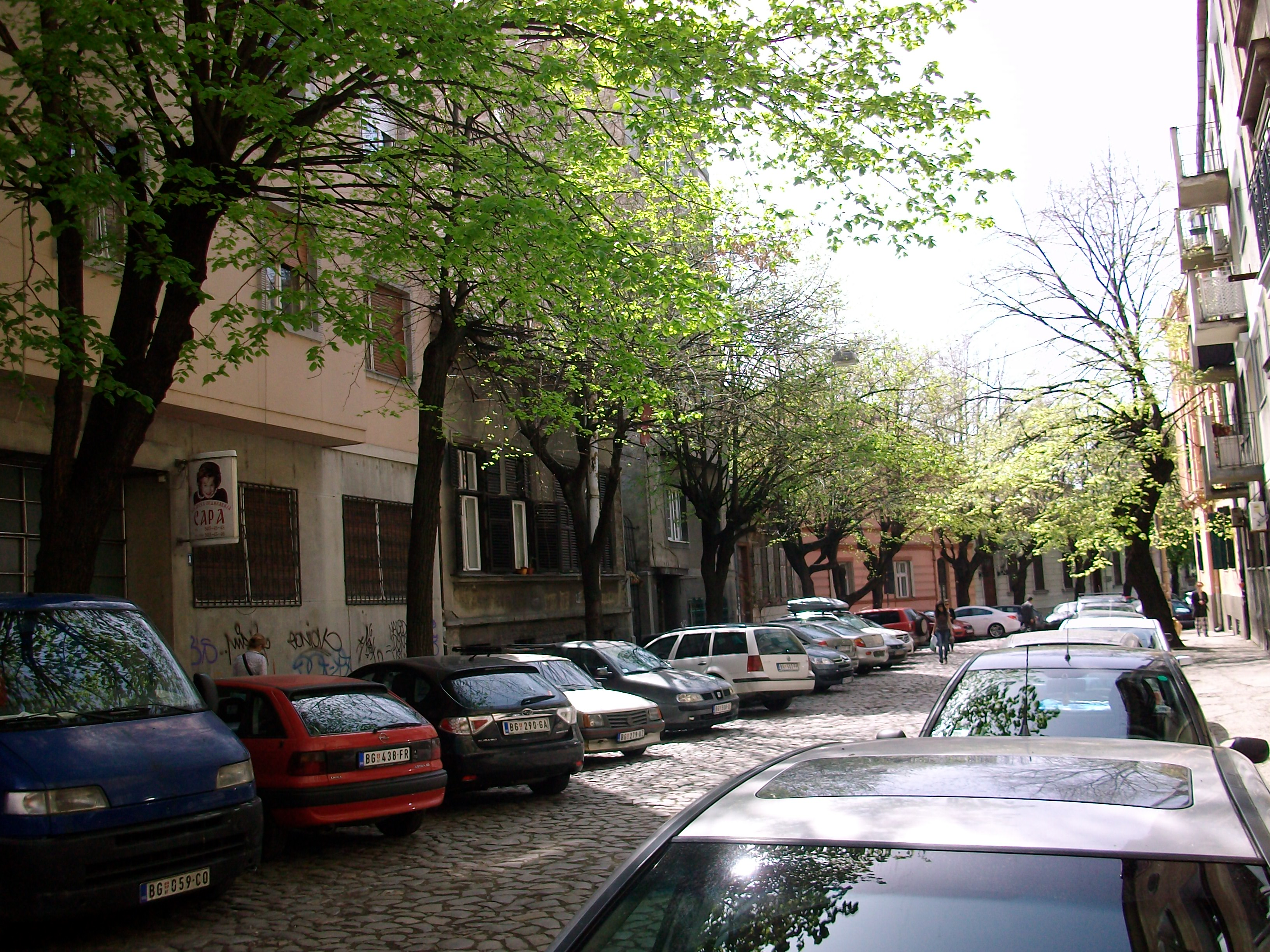 Косанчићев венац / Kosancicev venac